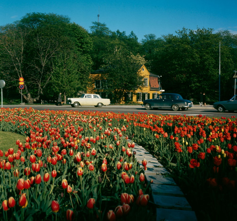 Tulpanplanteringar i Sveaplansrondellen. Vy mot Cedersdals malmgård i Vanadislunden